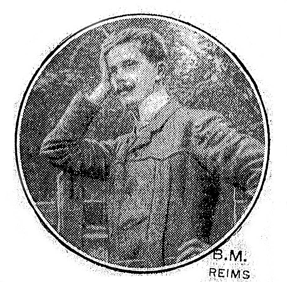 issu du fond iconographique de la bibliothèque d ereims.